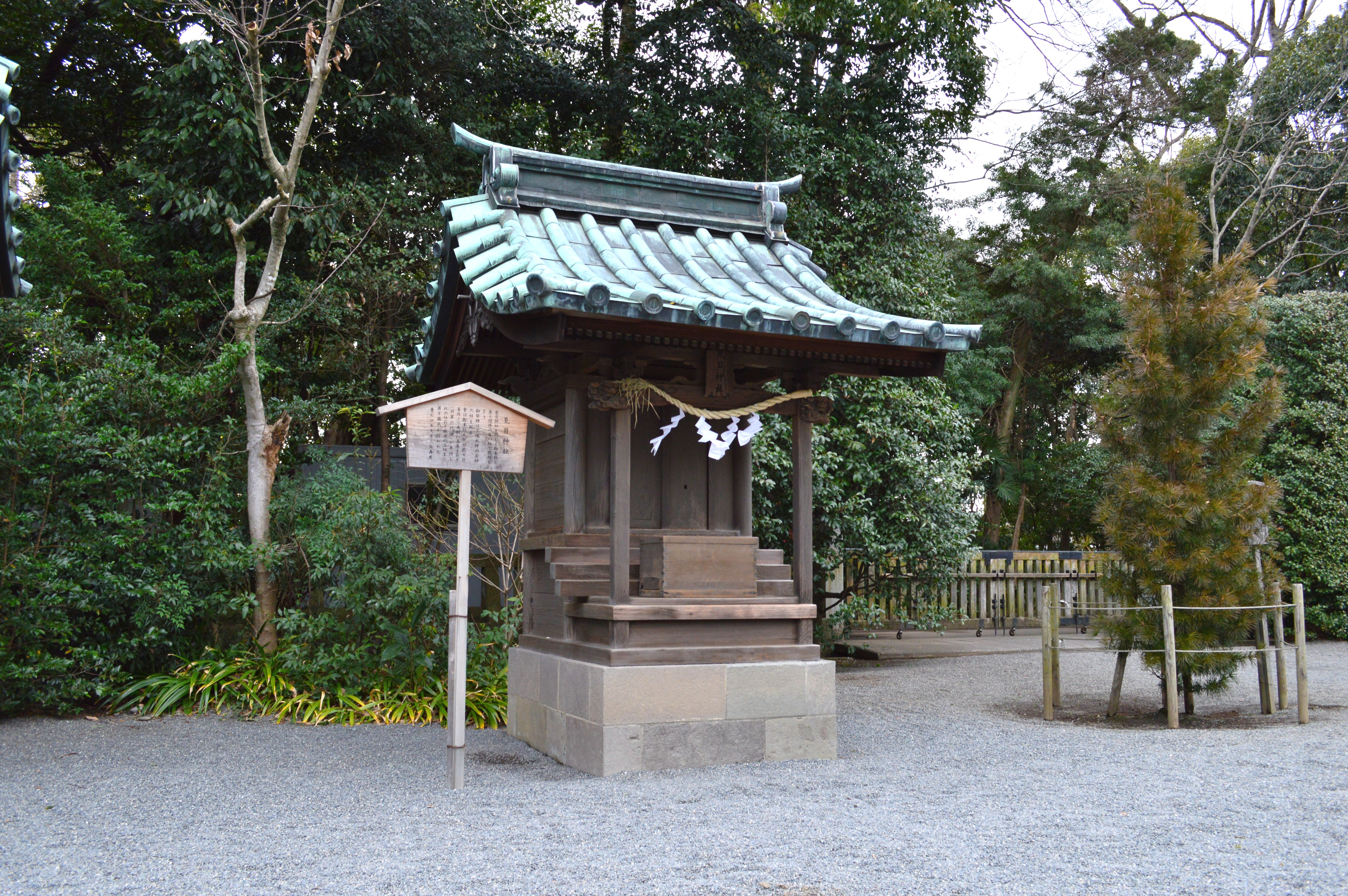 三嶋大社境内摂社 見目神社